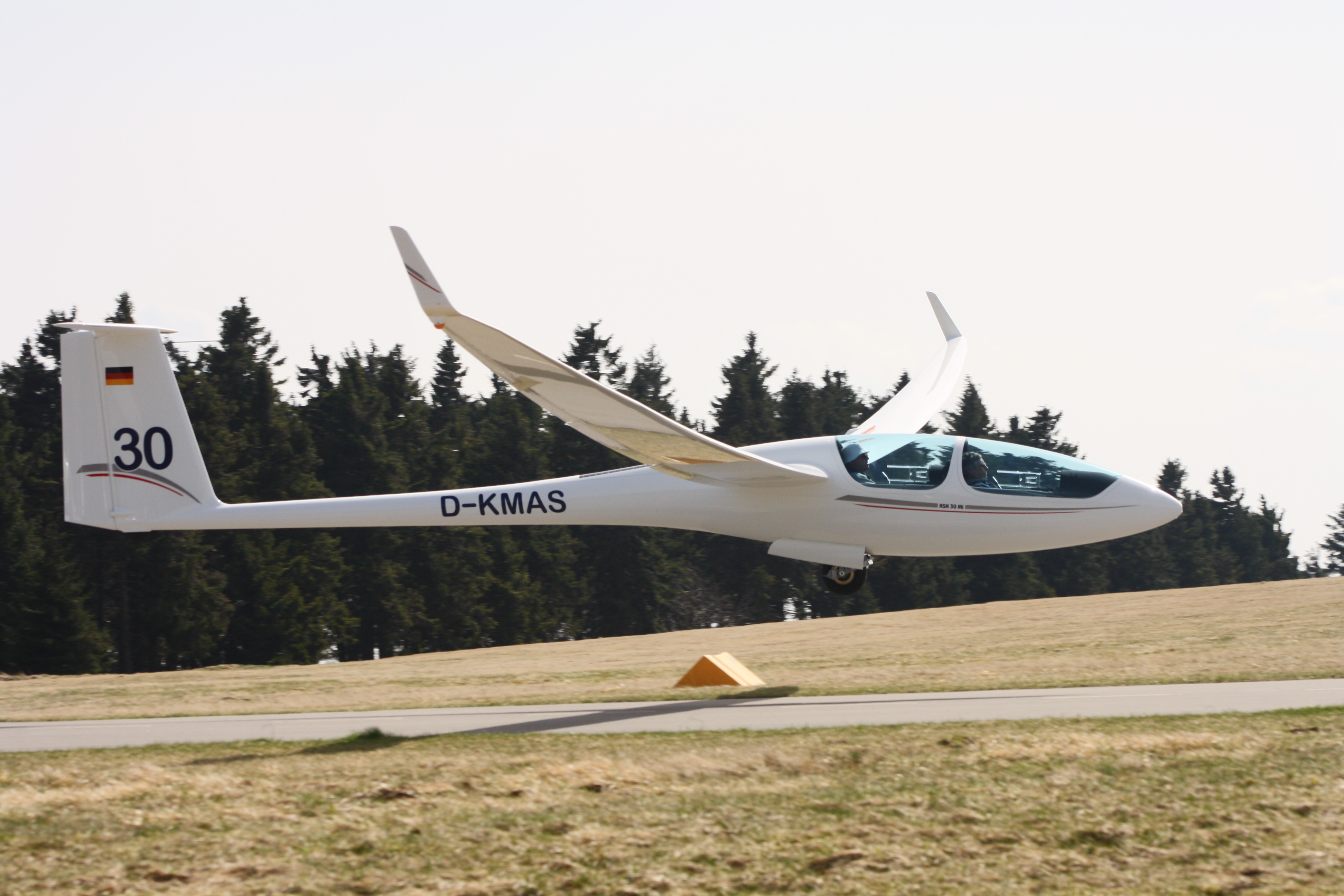 Erstflug Schleicher ASH 30 Mi